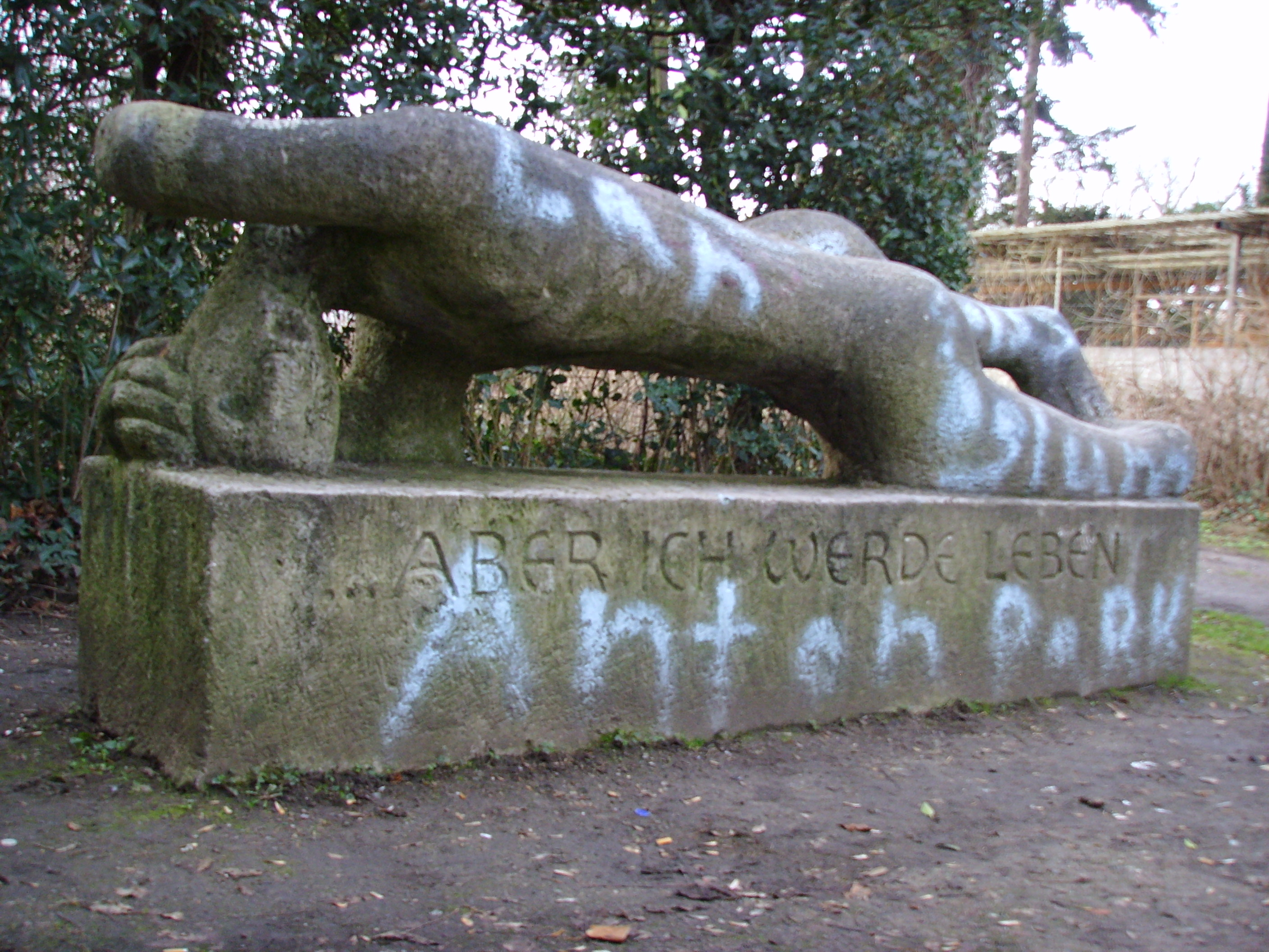 Frankfurt am Main-Heddernheim: Denkmal für die Gefallenen beider Weltkriege, Bildhauer: Warmuth, Grünanlage In der Römerstadt/Einmündung Kirchstraße